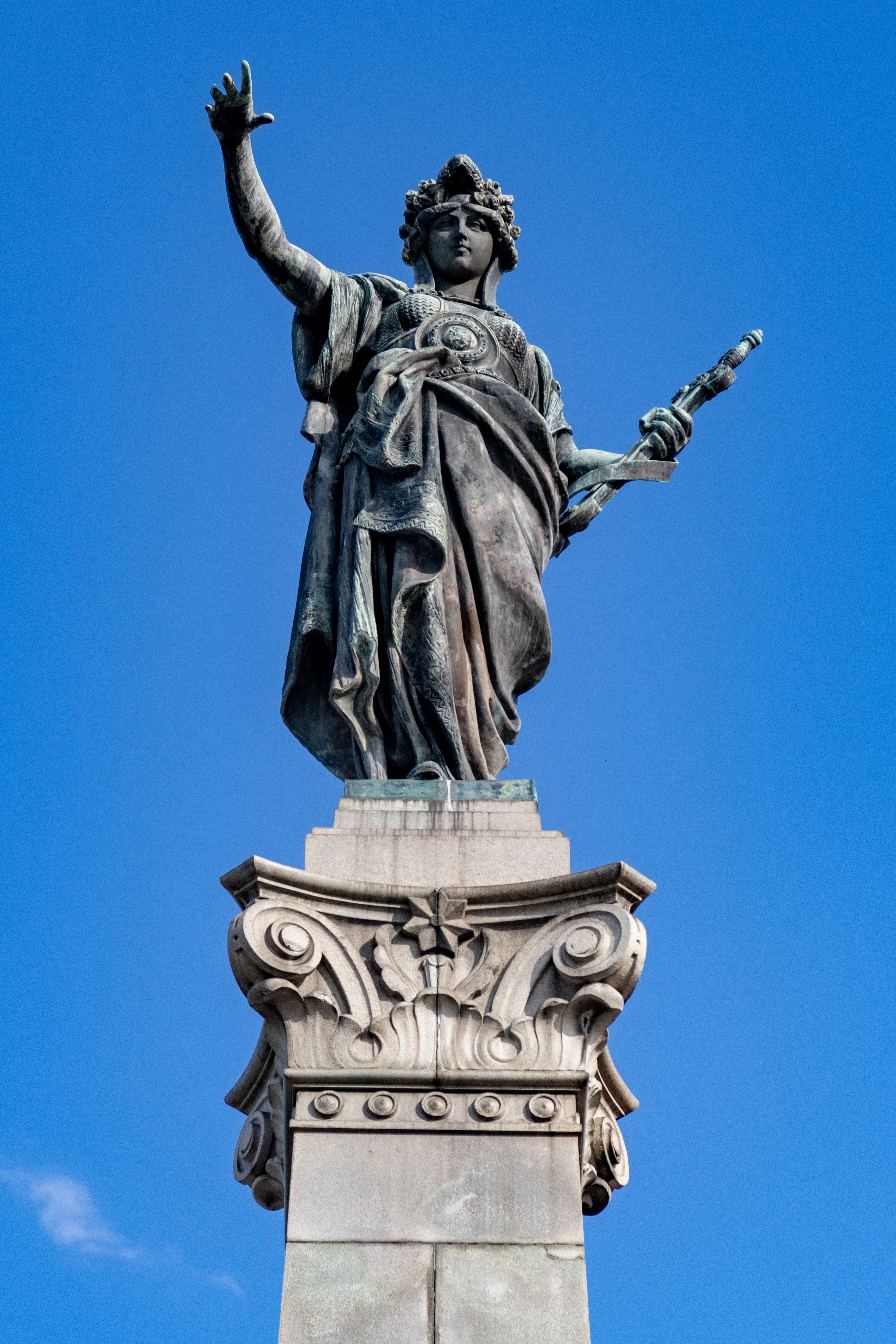 Снимката показва паметника на свободата в Русе отблизо.